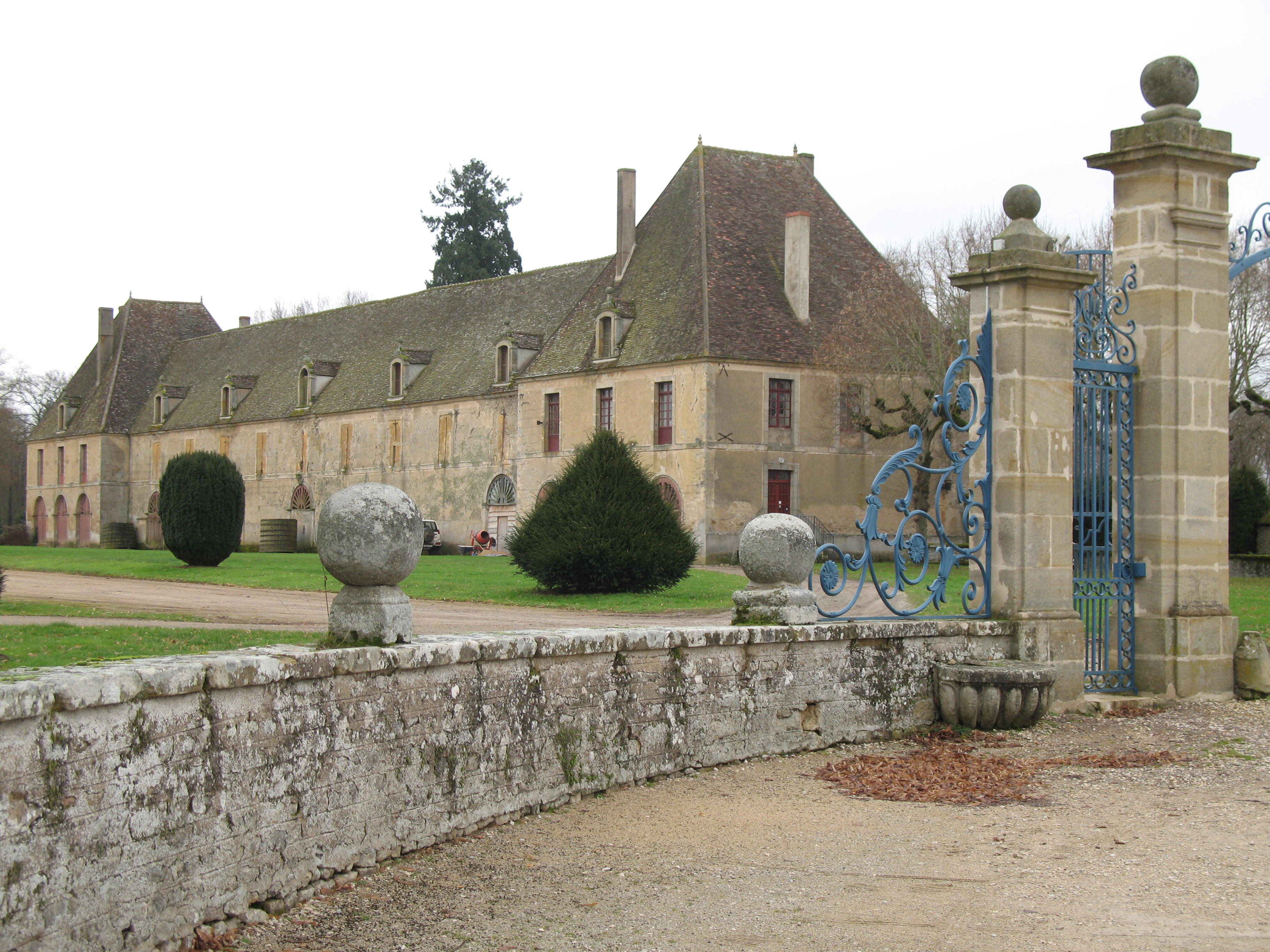 Communs du château de Sully en Saôn-et-Loire, vus depuis l'entrée